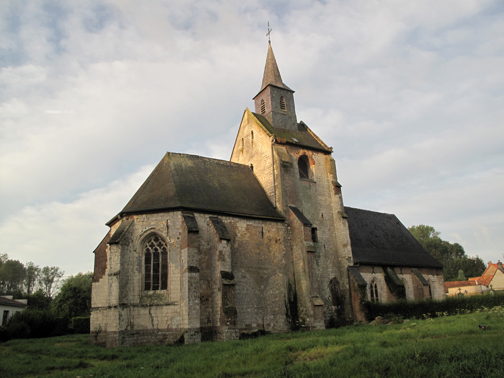 Cormont l'église